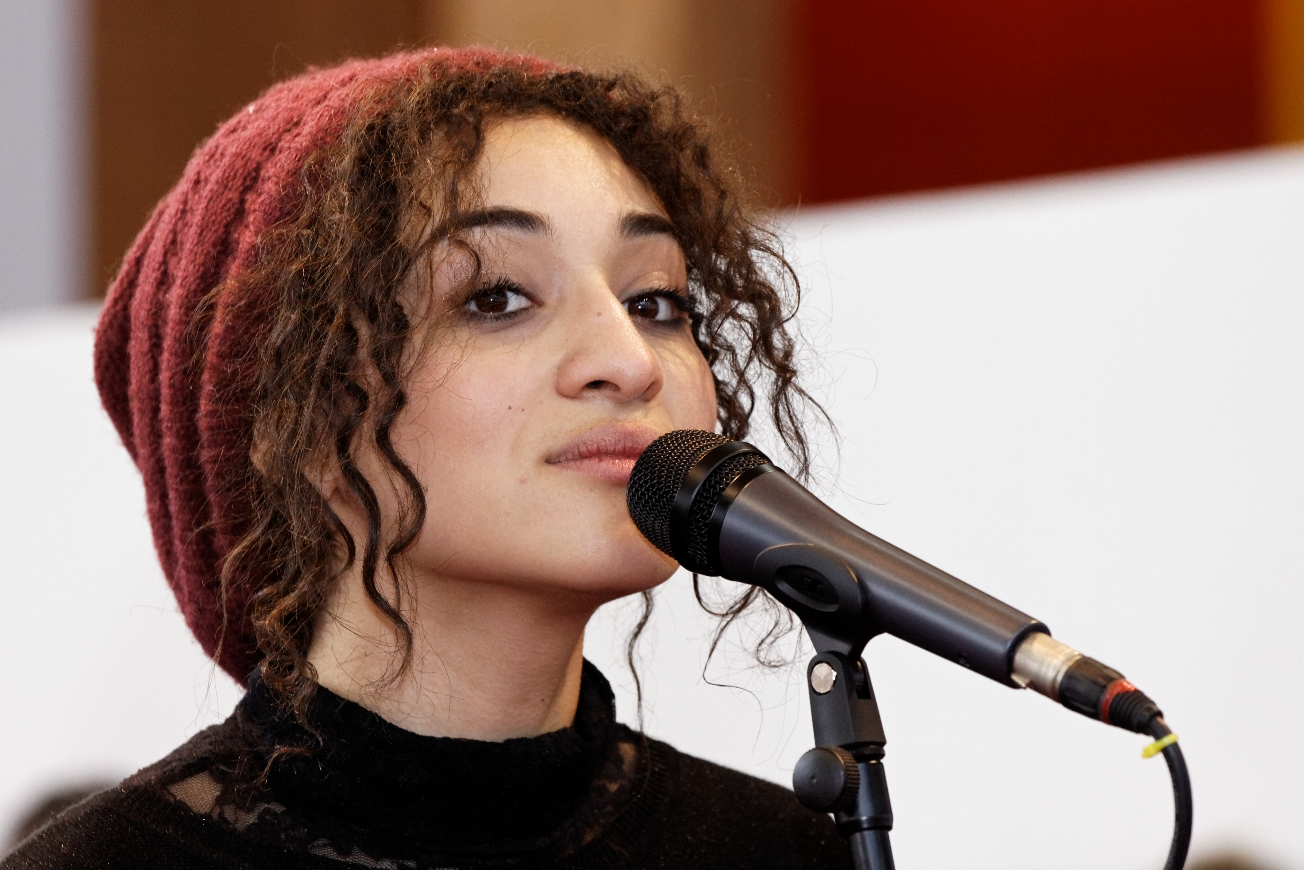 Camélia Jordana se produisant sur la scène du CNL lors du salon du livre de Paris 2012.